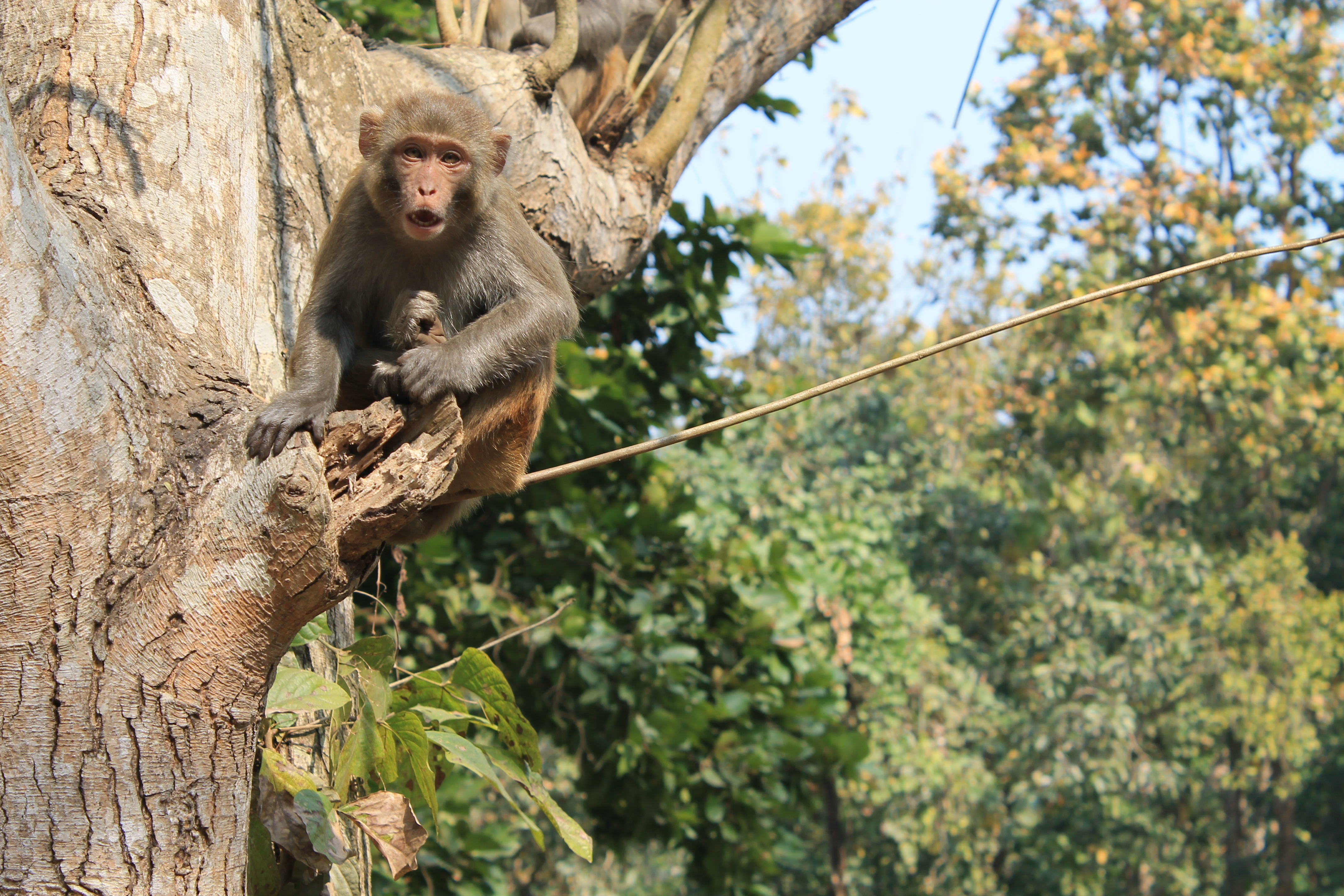 ভাওয়াল জাতীয় উদ্যান